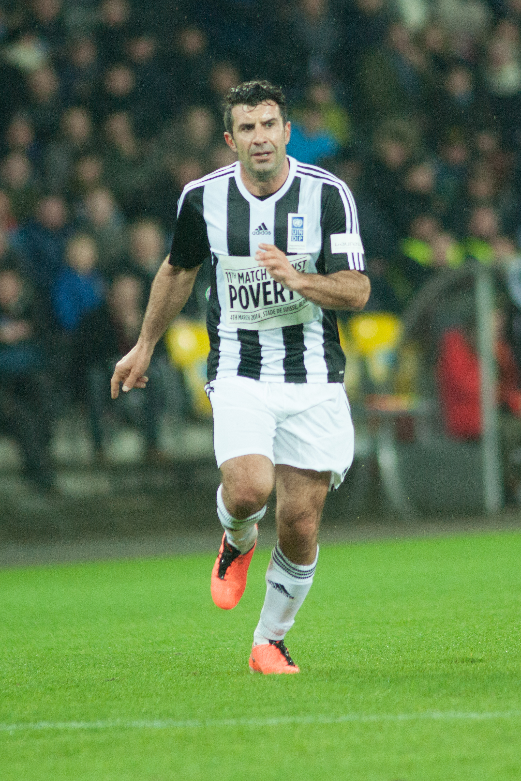 Football against poverty 2014 - Luis Figo